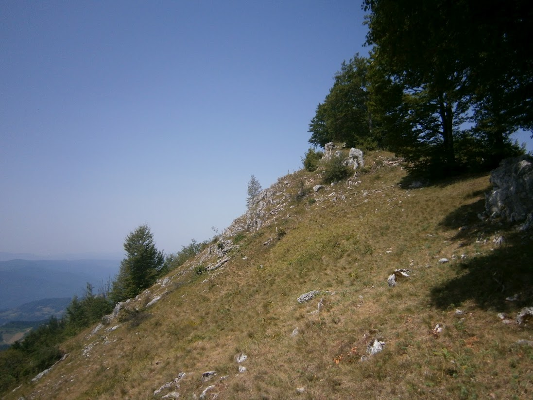 Gvozdačke stene.